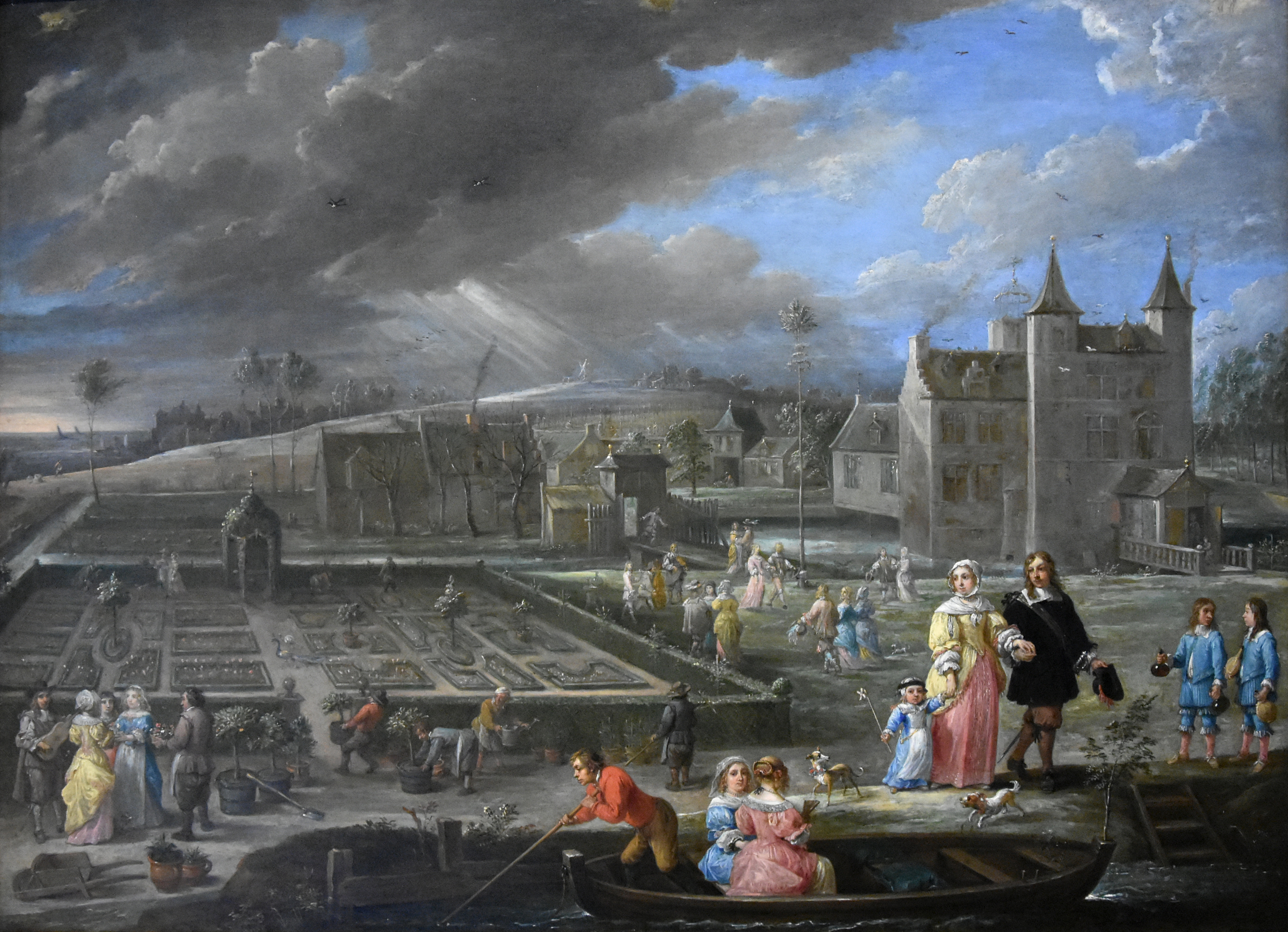 David Teniers de Jonge (1610-1690) De vier jaargetijden met het kasteel De Dry Torens te Perk, België waar Teniers een tijdlang woonde en waar zijn tweede vrouw Isabella de Fren overleed